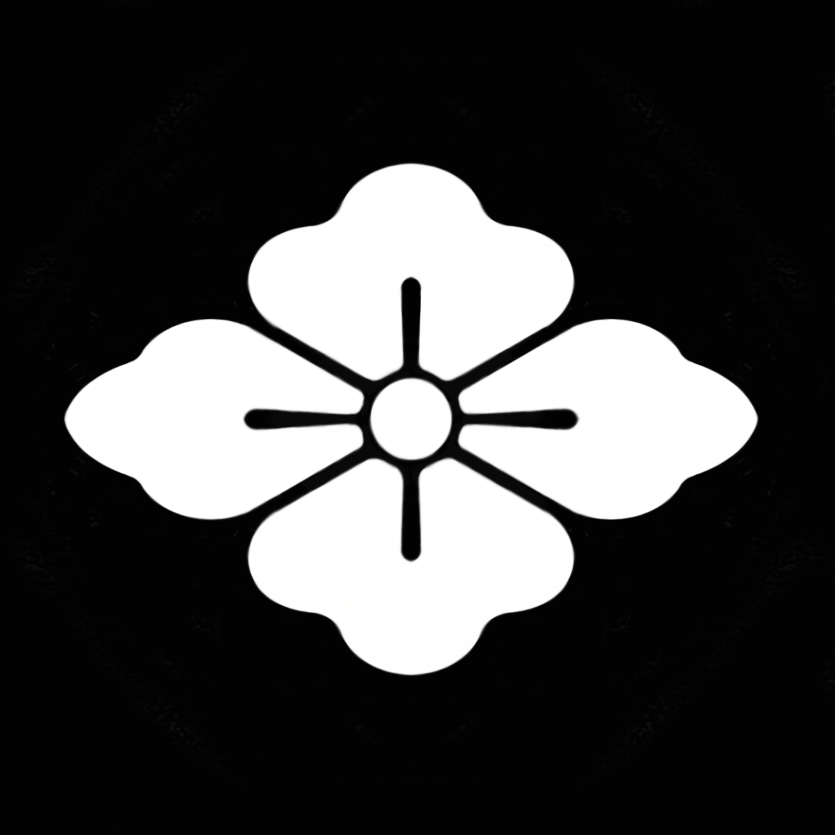 {Information Category:Kamon